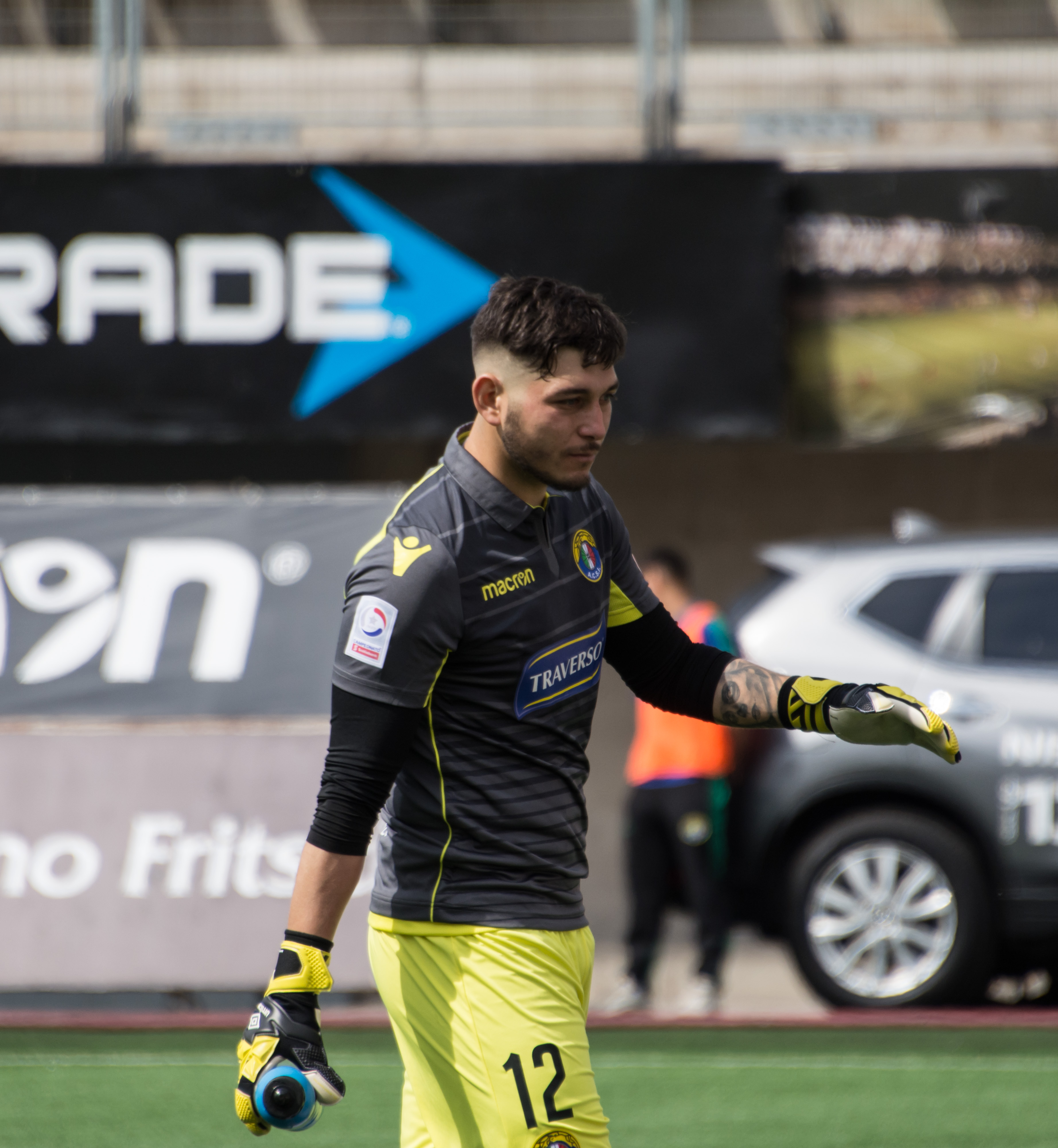 Eryin Sanhueza, Audax Italiano v Deportes Iquique, Estadio Bicentenario de La Florida, La Florida, Santiago, Chile